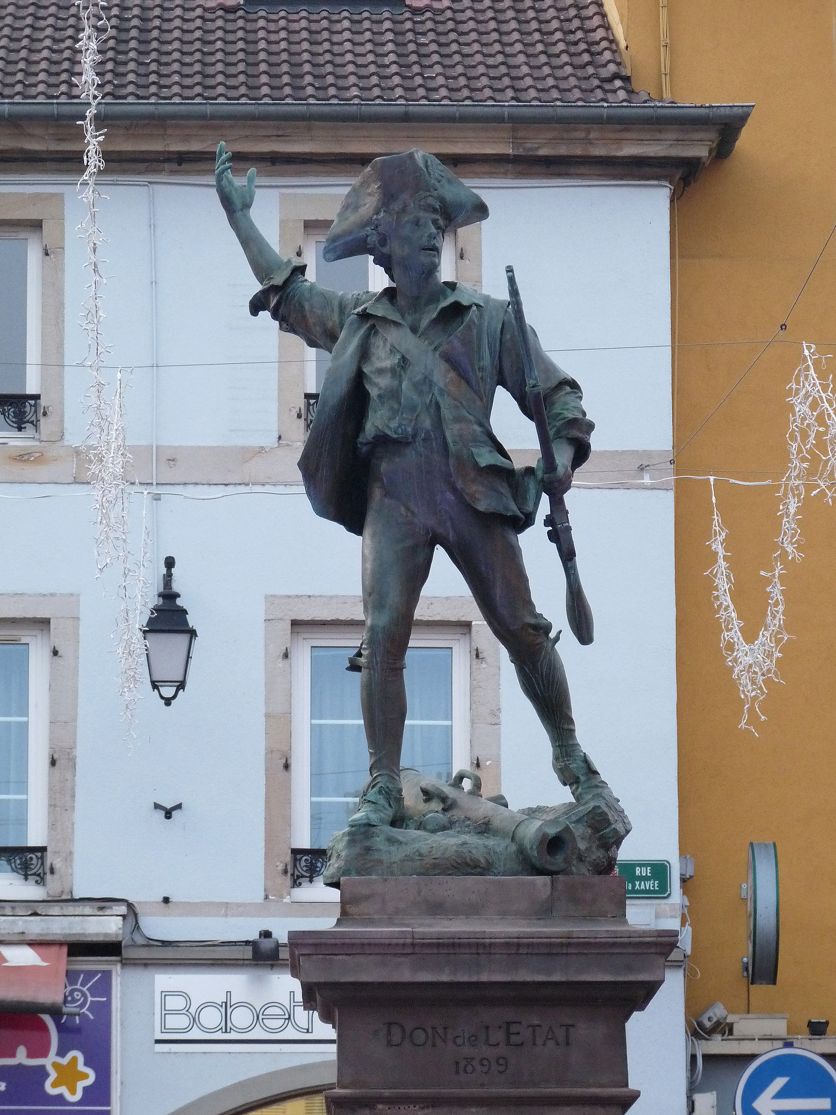 Remiremont : statue Un volontaire de 1792 (1899), inscrit aux MH en 1996